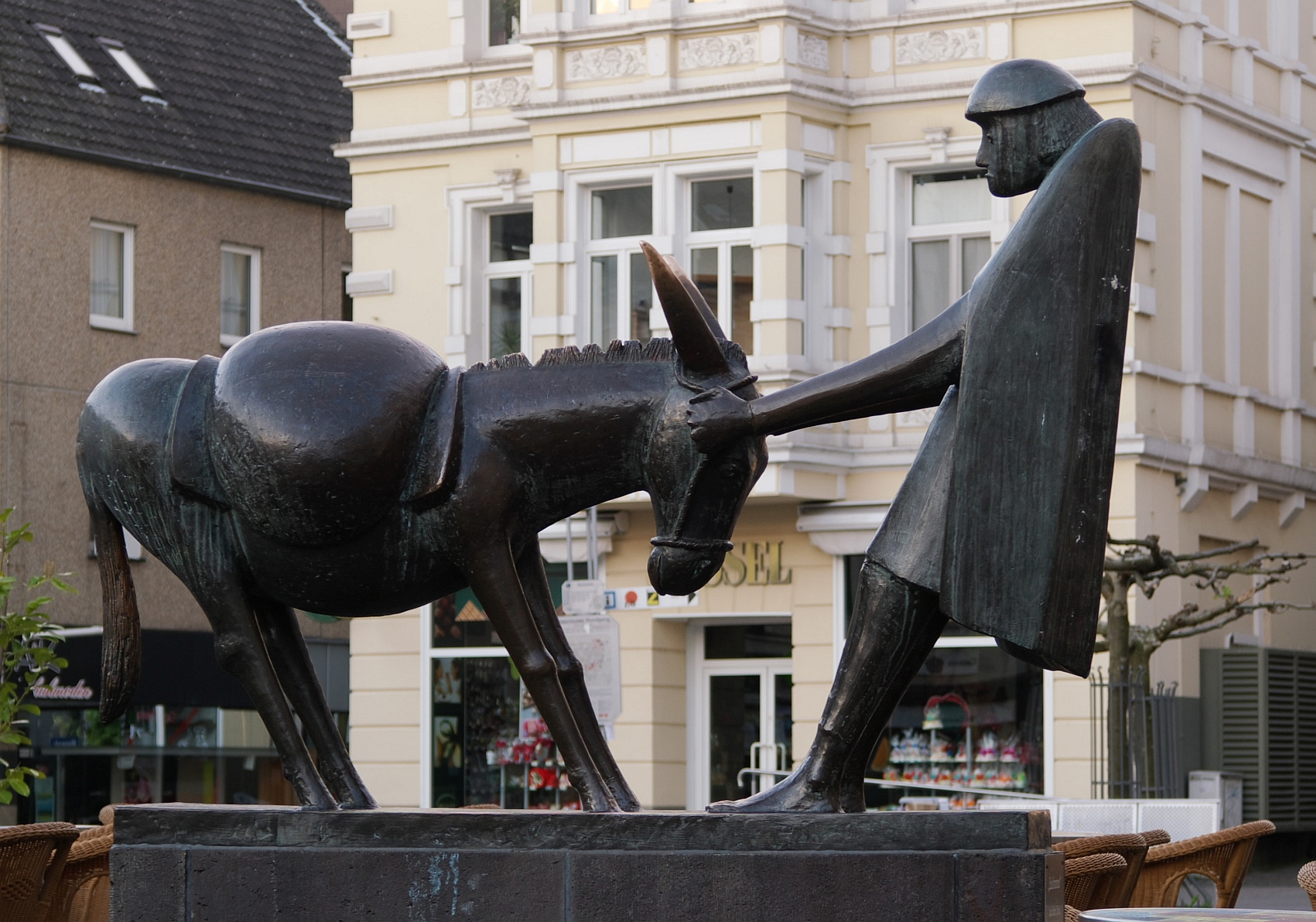 Eselsbrunnen Unna, Skulptur von Josef Baron